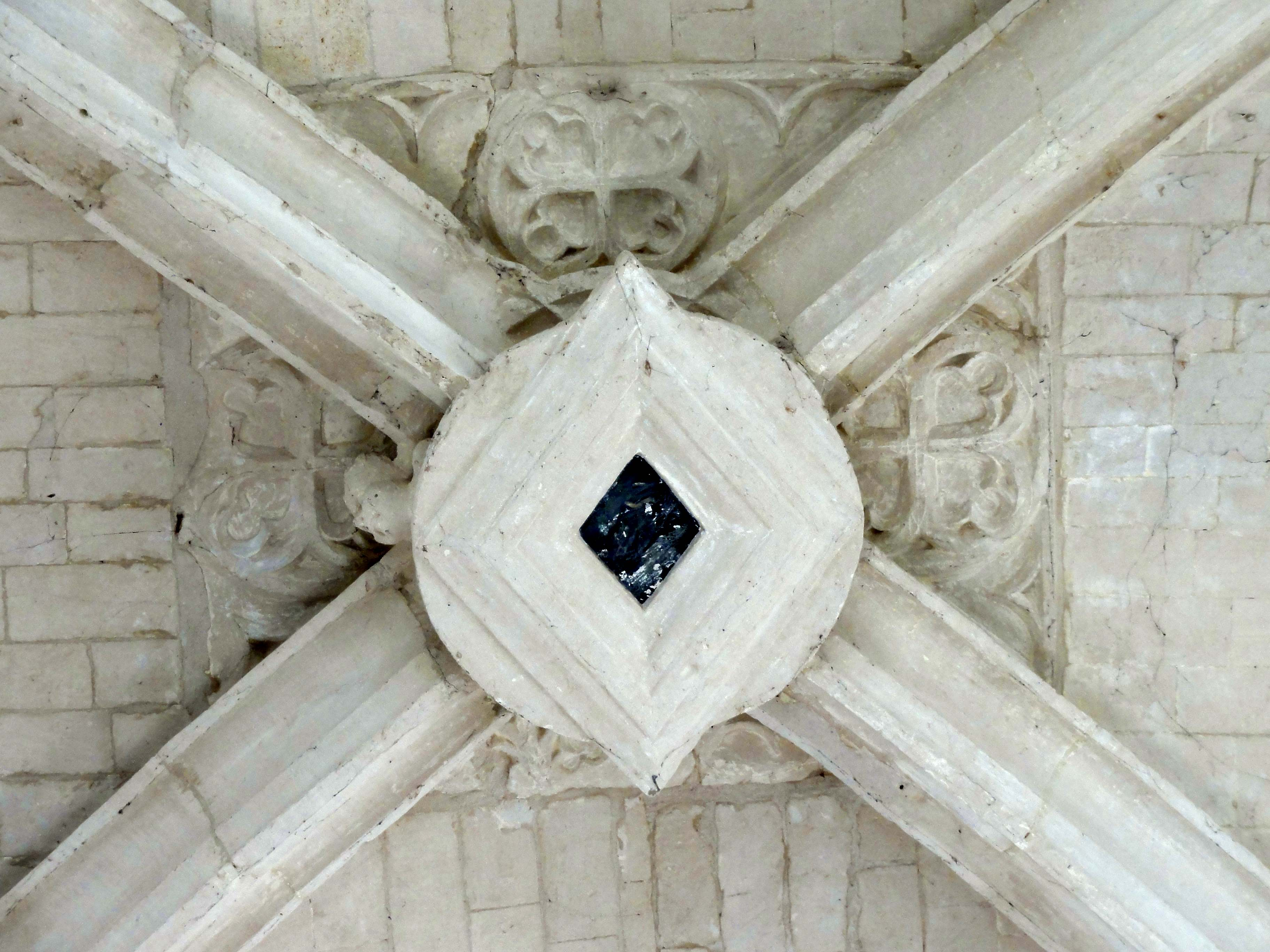 Clé de voûte (voir titre).